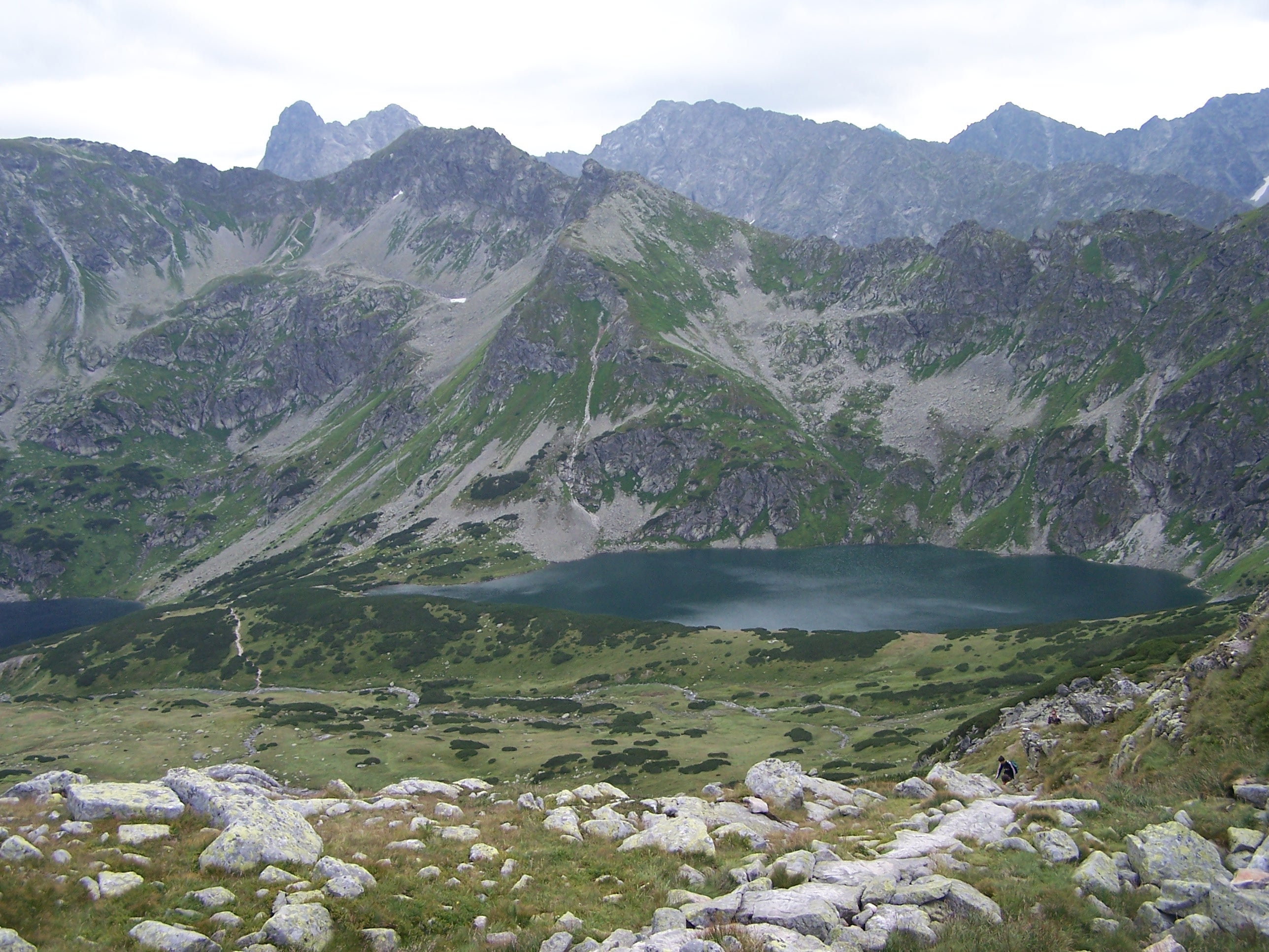 Dolina Pięciu Stawów Polskich